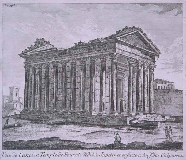 "Vue de l'ancien Temple de Pouzol dedié à Jupiter et ensuite à Auguste par Calpurnius". Incisione. Autore sconosciuto.